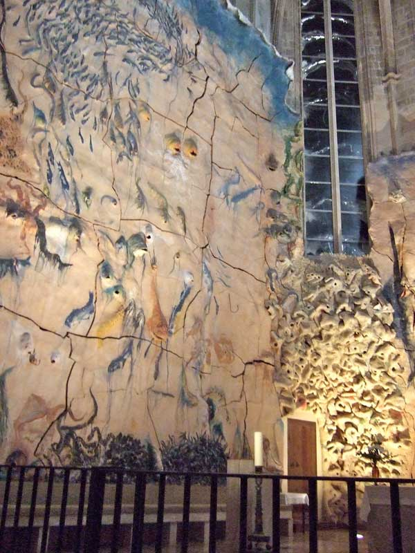 Keramiken von Miquel Barceló in der Kathedrale La Seu in Palma auf Mallorca. „Die wundersame Vermehrung von Brot und Fisch“